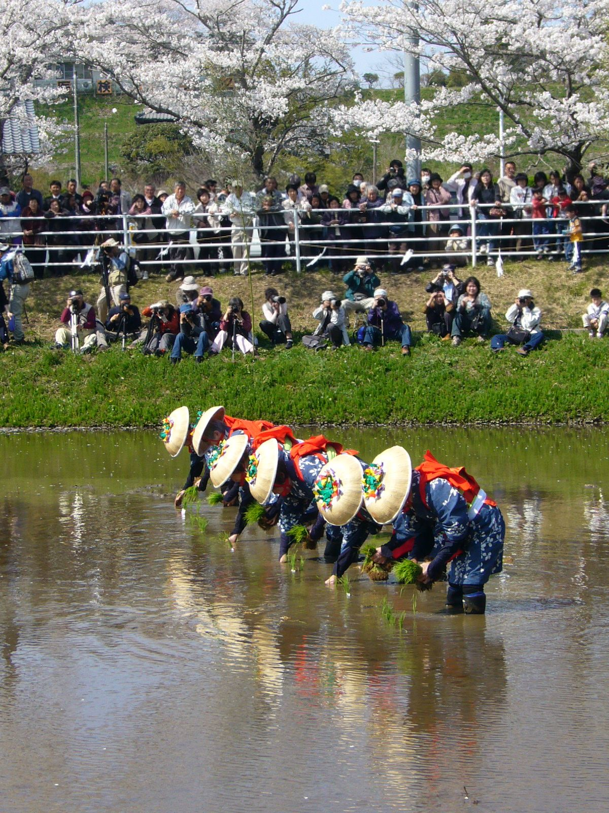 Rice-transplanting Festival in Katori-jingu 1,katori-city,japan